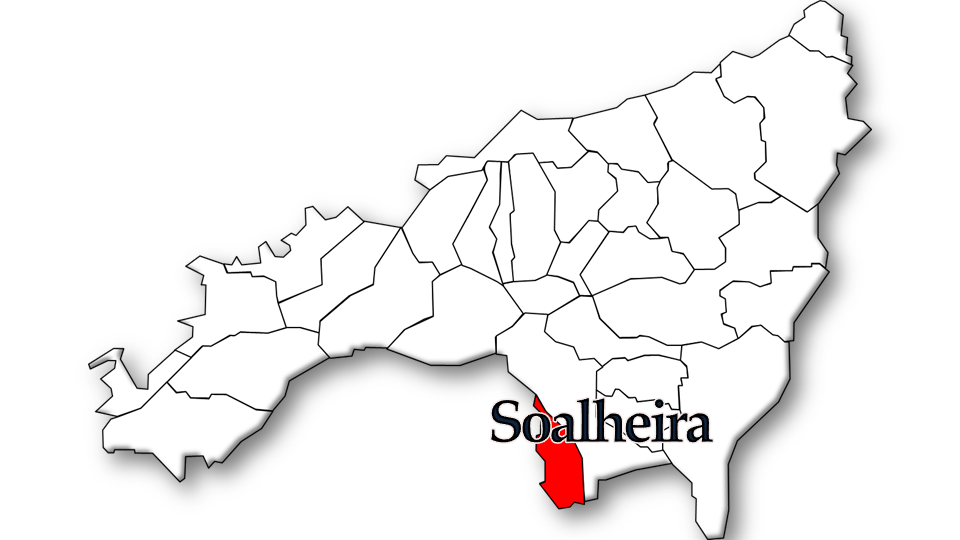 População